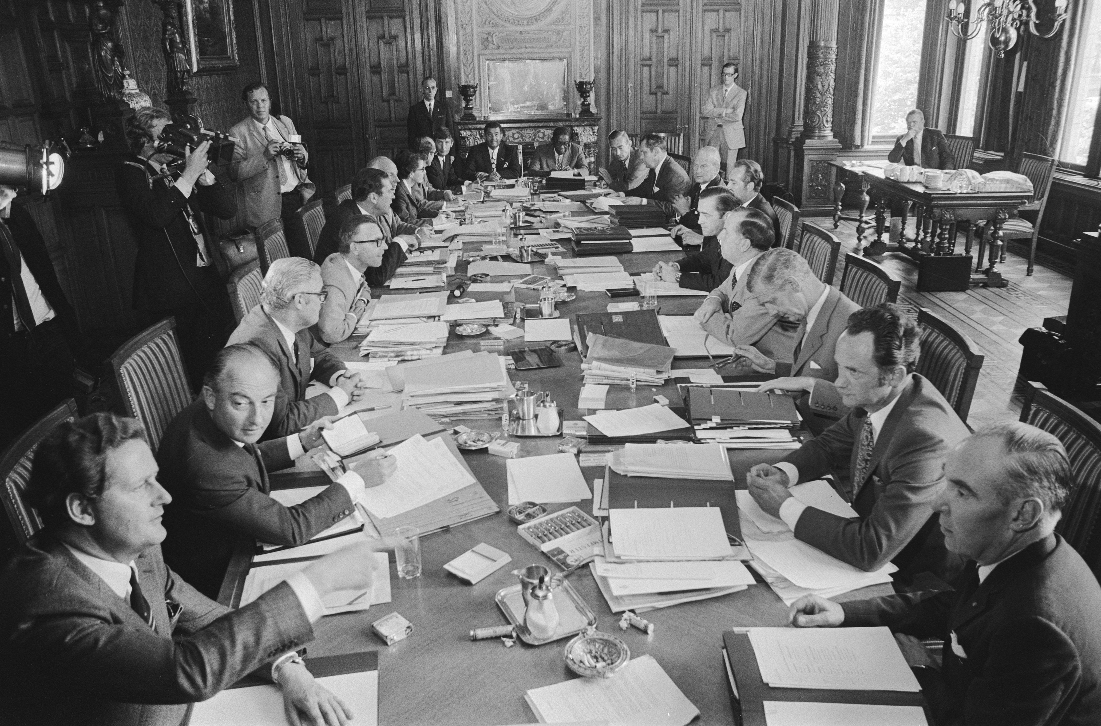 Collectie / Archief : Fotocollectie Anefo Reportage / Serie : [ onbekend ] Beschrijving : Rijksministerraad bijeen met nieuwe kabinet Biesheuvel, Den Haag , ministerraad aan tafel Datum : 9 juli 1971 Locatie : Den Haag, Zuid-Holland Trefwoorden : kabinetten, ministerraden Fotograaf : Verhoeff, Bert / Anefo Auteursrechthebbende : Nationaal Archief Materiaalsoort : Negatief (zwart/wit) Nummer archiefinventaris : bekijk toegang 2.24.01.05 Bestanddeelnummer : 924-7171